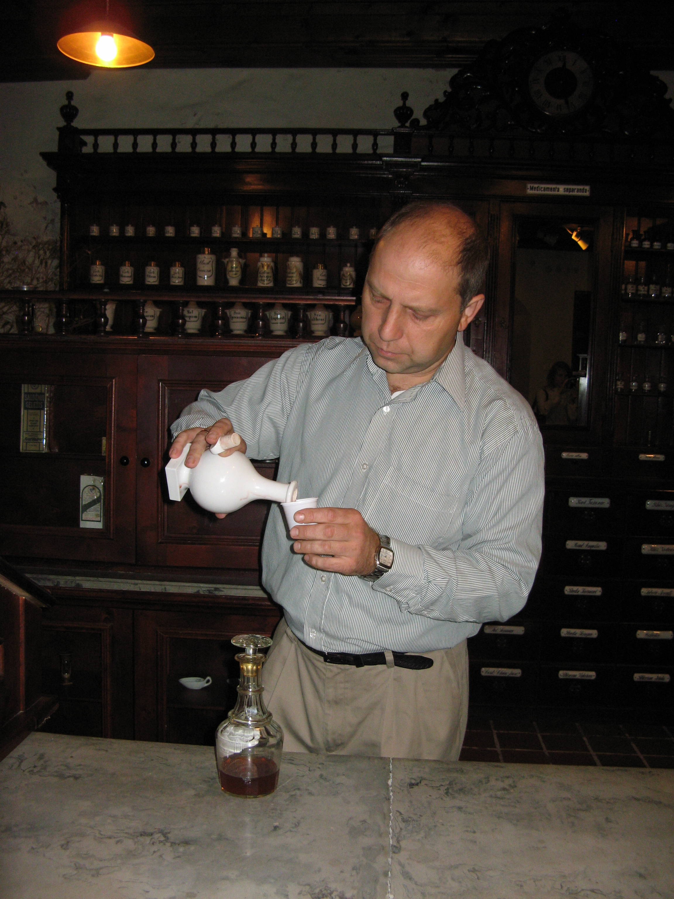 Lietuvos medicinos ir farmacijos muziejaus vadovas Tauras Mekas demonstruoja senovės vaistų gamybą.